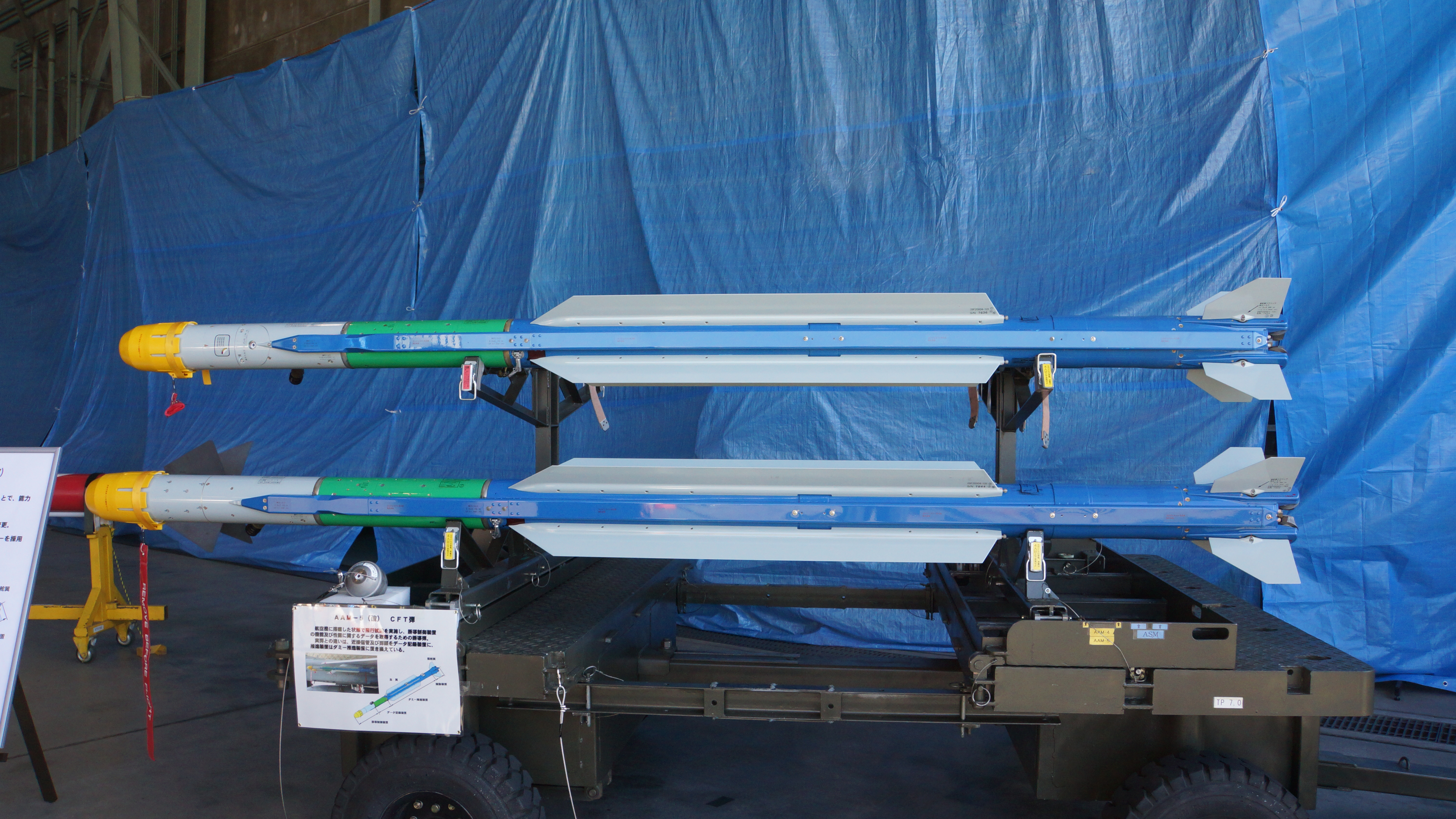 航空自衛隊 04式空対空誘導弾（AAM-5）及び04式空対空誘導弾（改）（AAM-5（改））。 15年10月25日 岐阜基地にて。